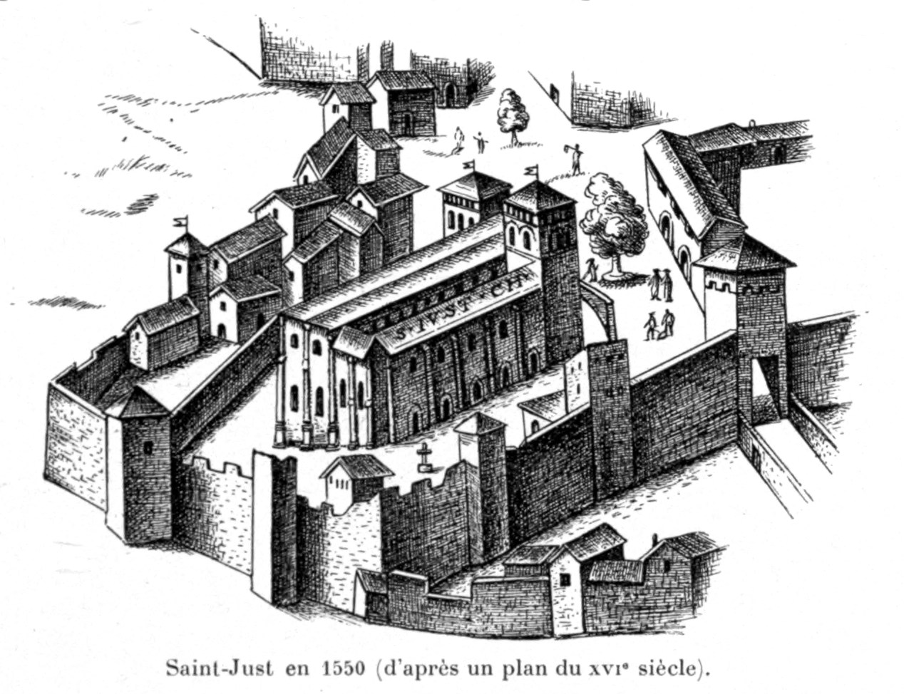 Illustration pour l'Histoire des églises et chapelles de Lyon